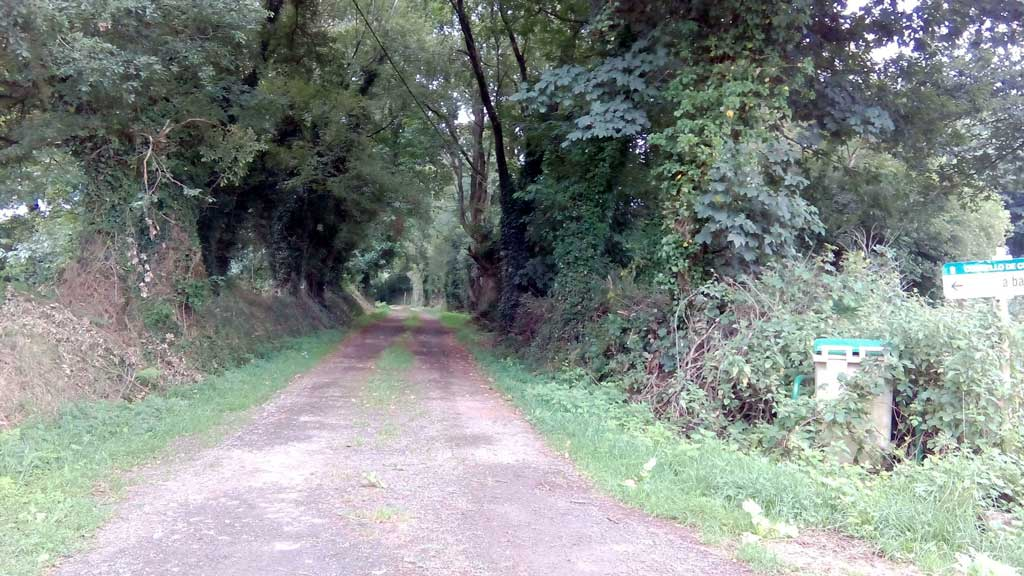 Vista da Baiuca, Curtis.